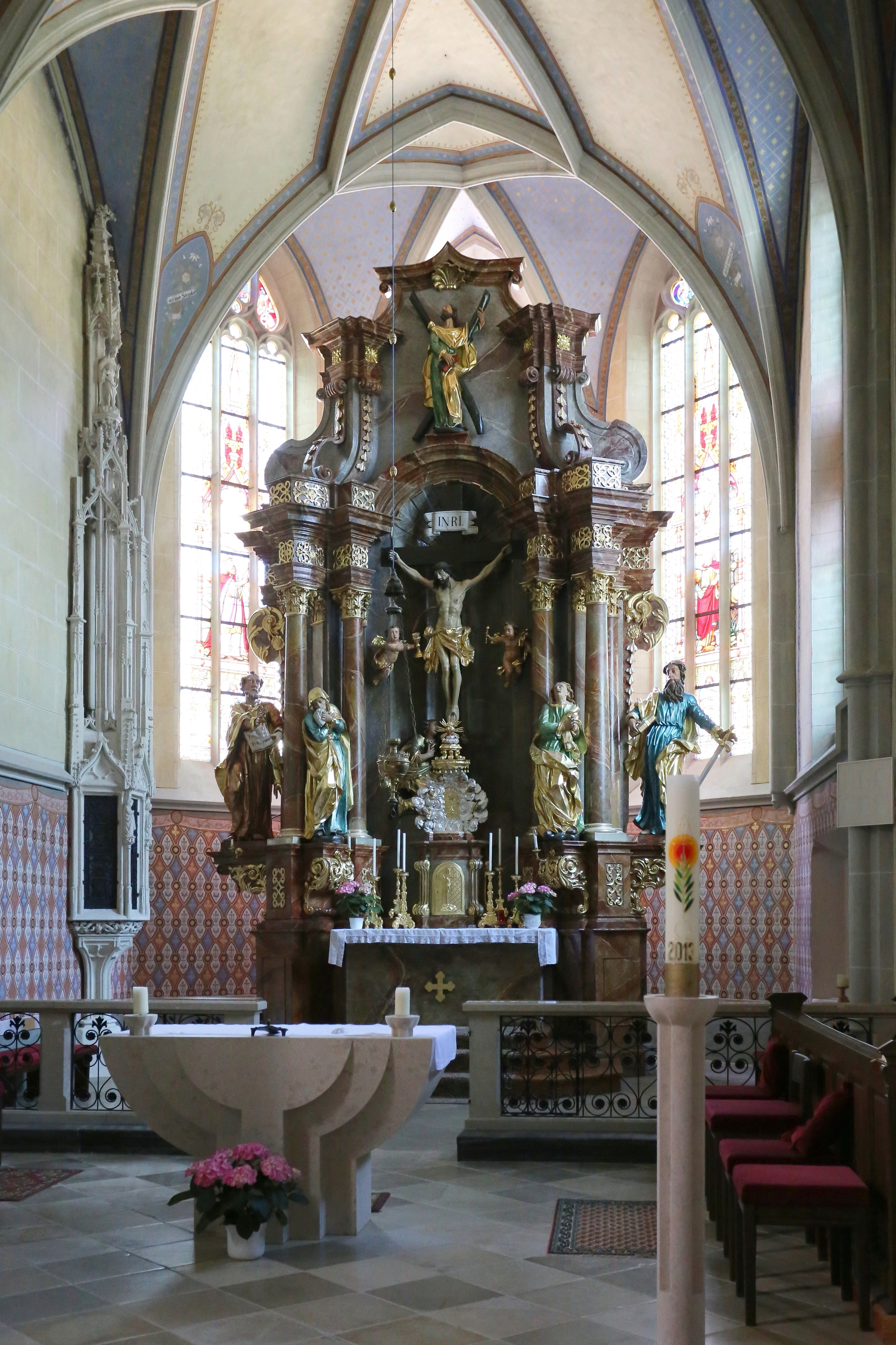 Hochaltar der Wallfahrts- und Pfarrkirche hl. Andreas in Heiligenblut, ein Ortsteil der niederösterreichischen Marktgemeinde Raxendorf.